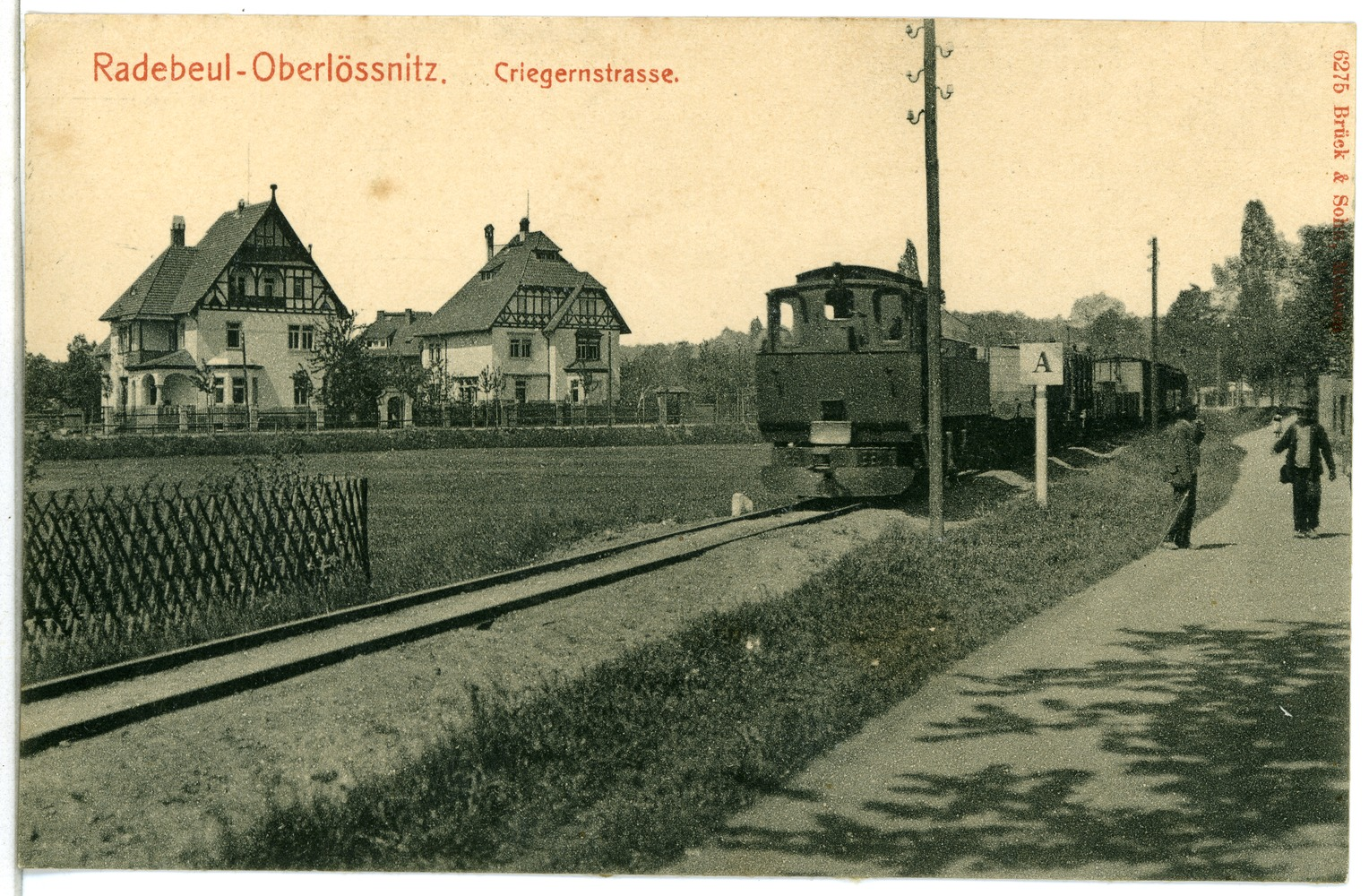 Radebeul; Criegernstraße mit Eisenbahn This postcard is from publisher Brück & Sohn in Meißen ( postcard has a unique number 06275 and is available in a higher resolution at the publisher. This images was uploaded in a cooperation project between Wikipedians and the publisher.